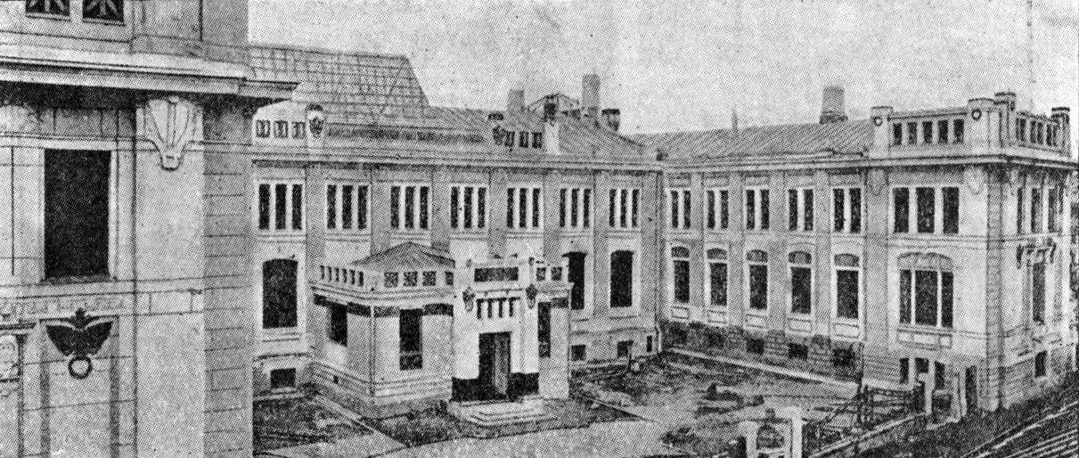 Здание московской сберегательной кассы на Петровке, построенное в 1907 году